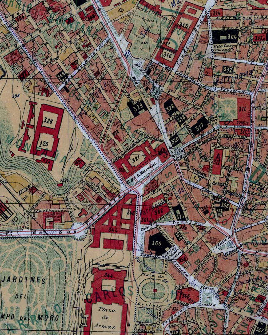 Cuartel de San Gil (321) en el plano de Madrid de Facundo Cañadas, publicado en 1902